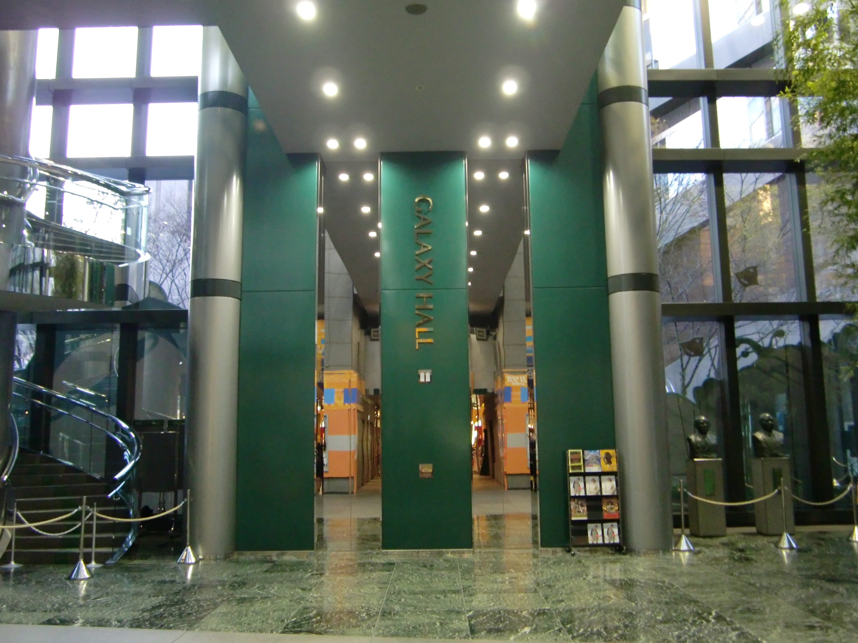 Galaxy Hall,Chayamachi Kita-ku Osaka Japan.